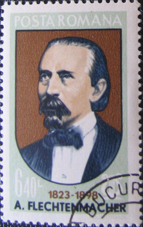 Source: Post of Romania